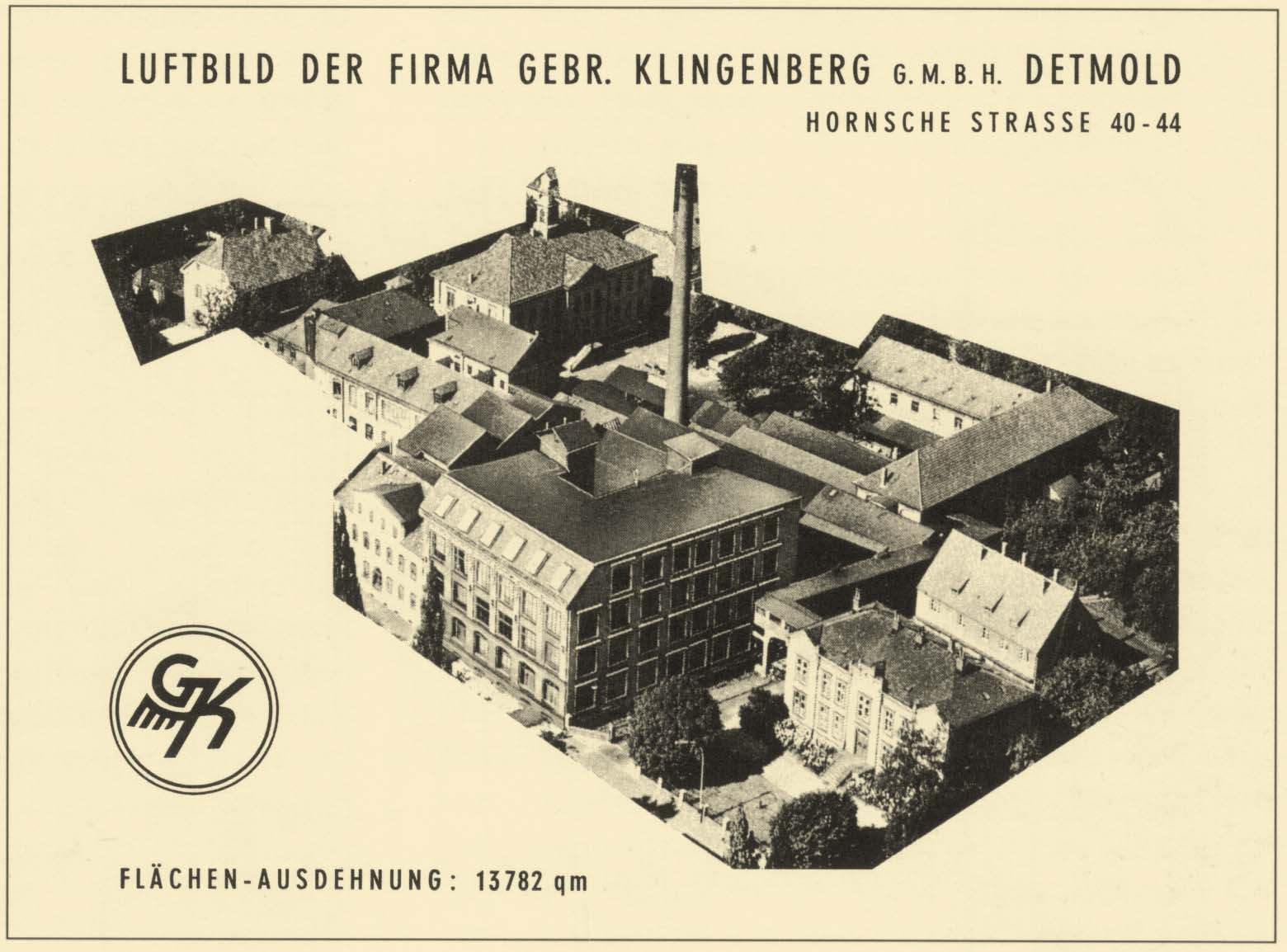 Luftbild der Fa. Gebr. Klingenberg, Detmold